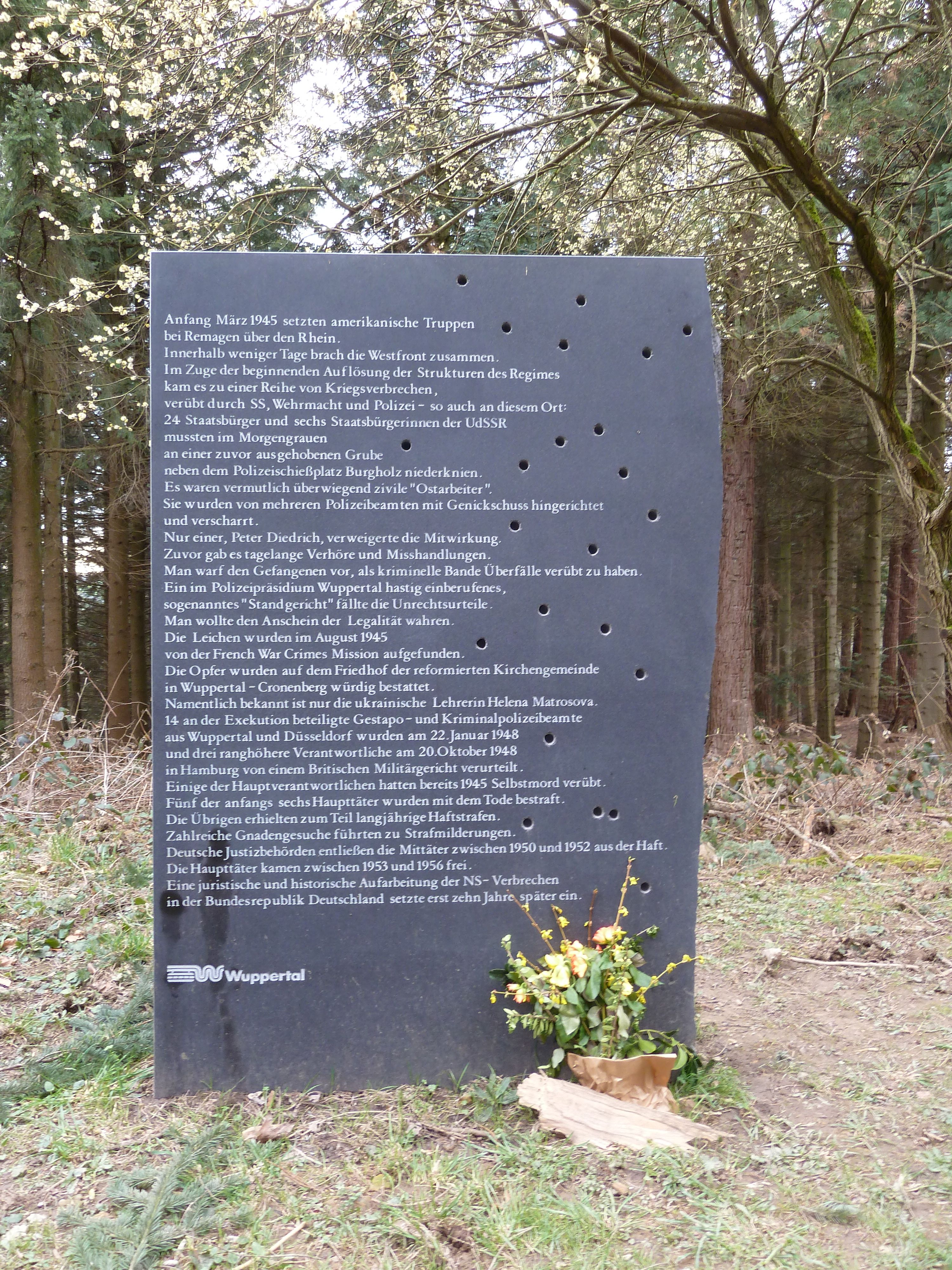 Gedenkstein an das Endphaseverbrechen auf dem Burggrafenberg im Staatsforst Burgholz in Wuppertal